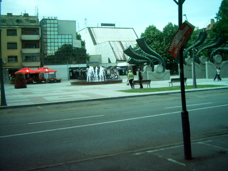 Ruma